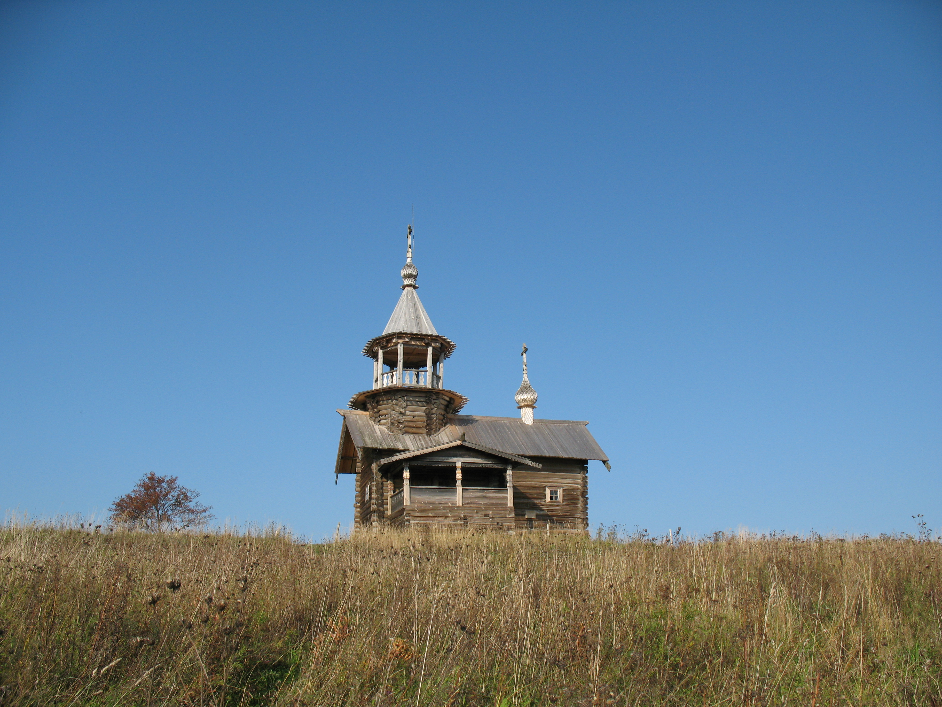 Часовня Спаса Нерукотворного Образа, из д. Вигово (Республика Карелия, Медвежьегорск, о. Кижи, музей-заповедник деревянного зодчества "Кижи")